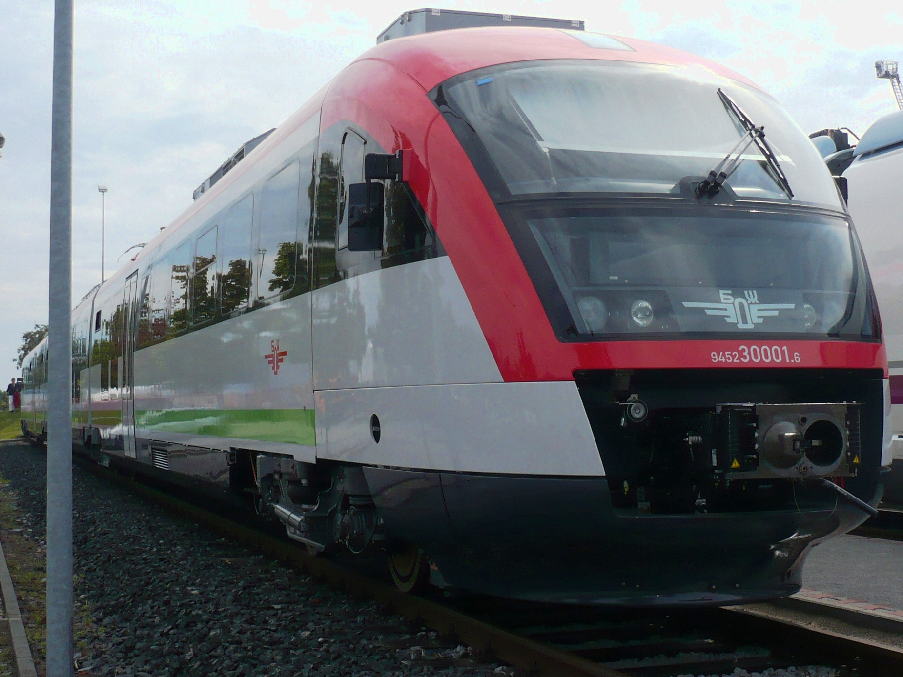 Baureihe 9452 der Bulgarischen Staatsbahnen